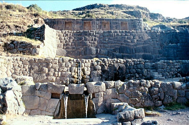 Tambo Machay